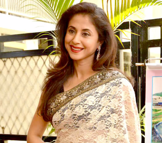 Urmila Matondkar at Dadasaheb Phalke Akademy Awards 2013